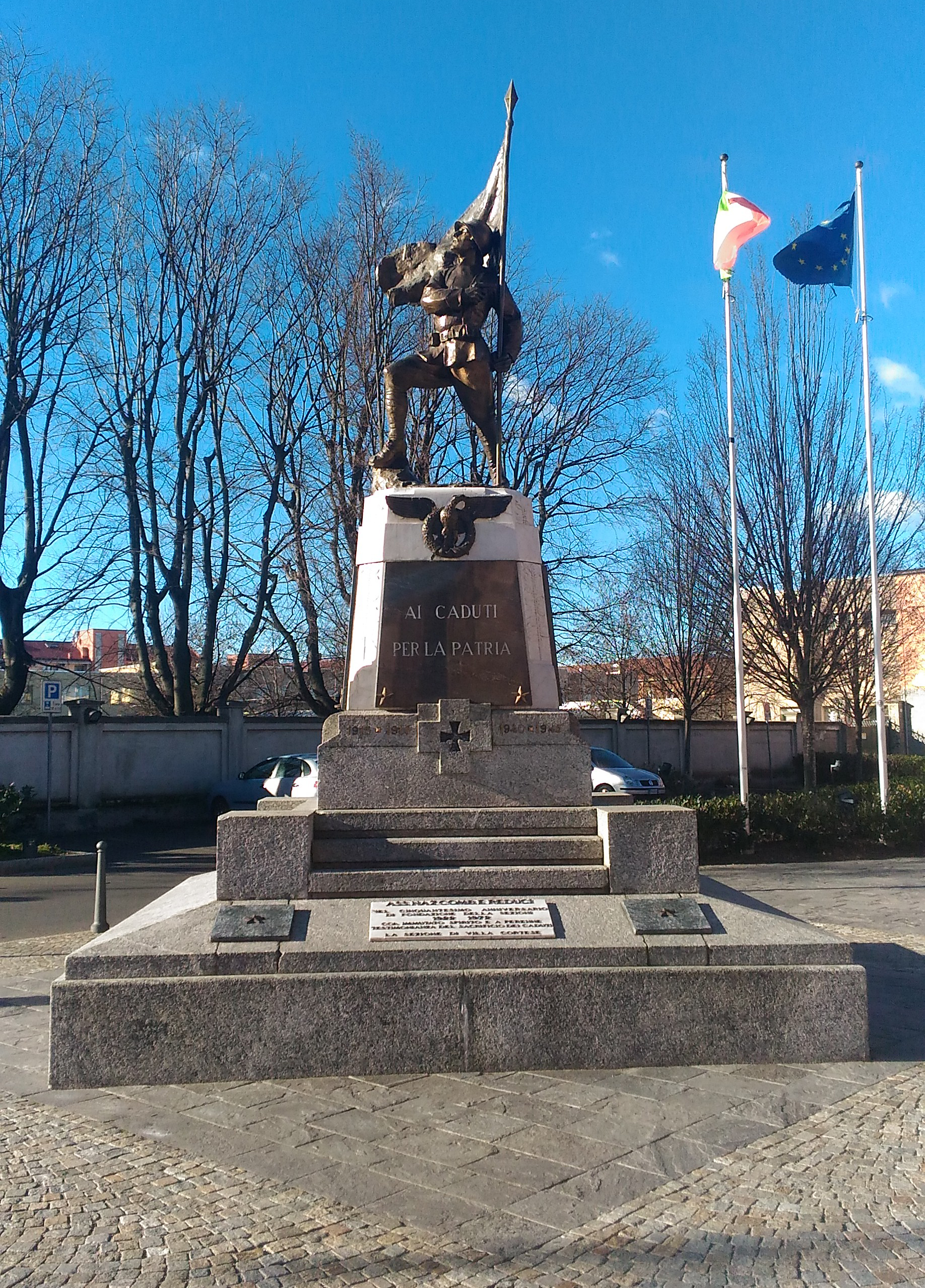 Il monumento ai Caduti in piazza Vittorio Veneto a Villa Cortese (MI).